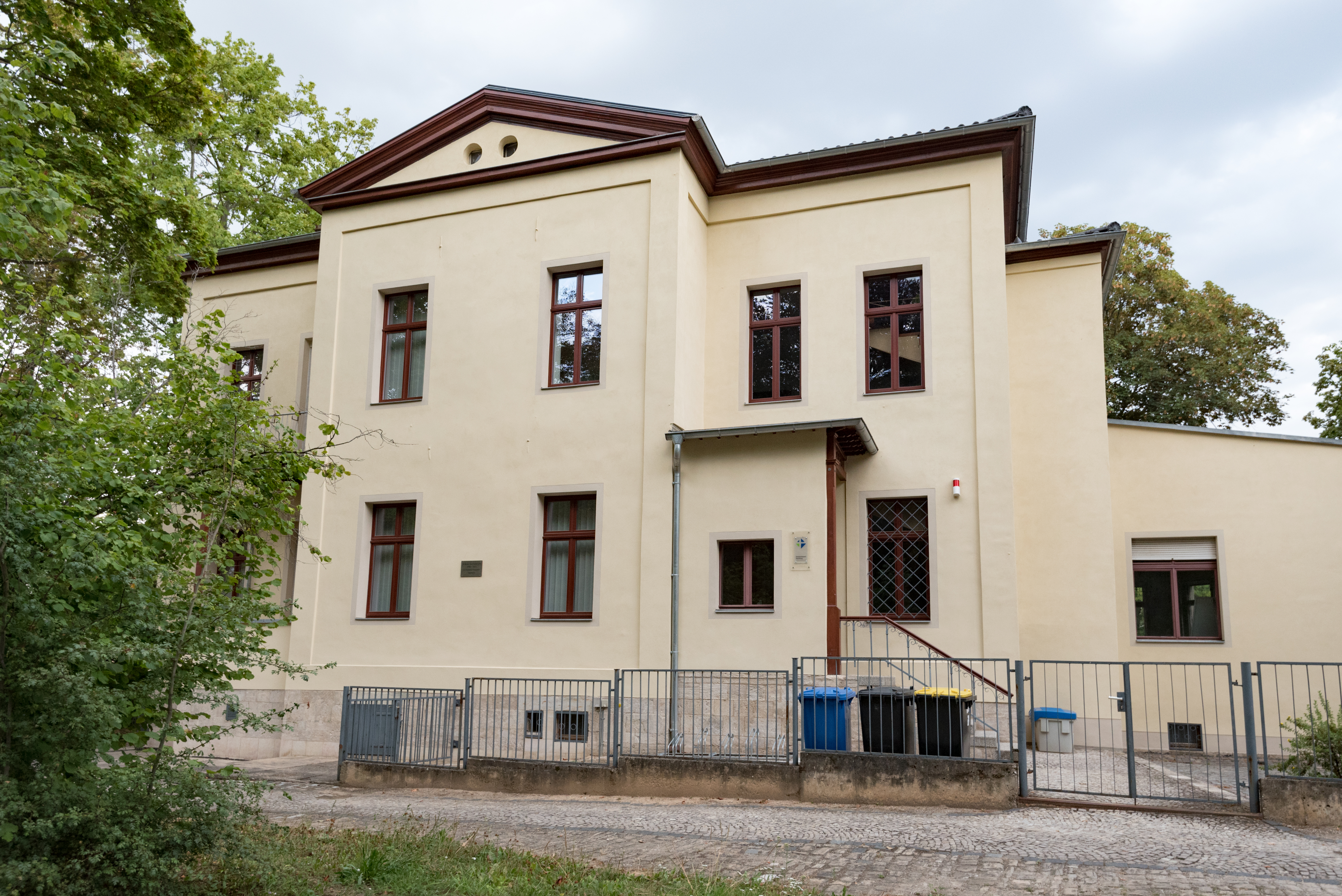 Naumburg (Saale), Charlottenstraße 1